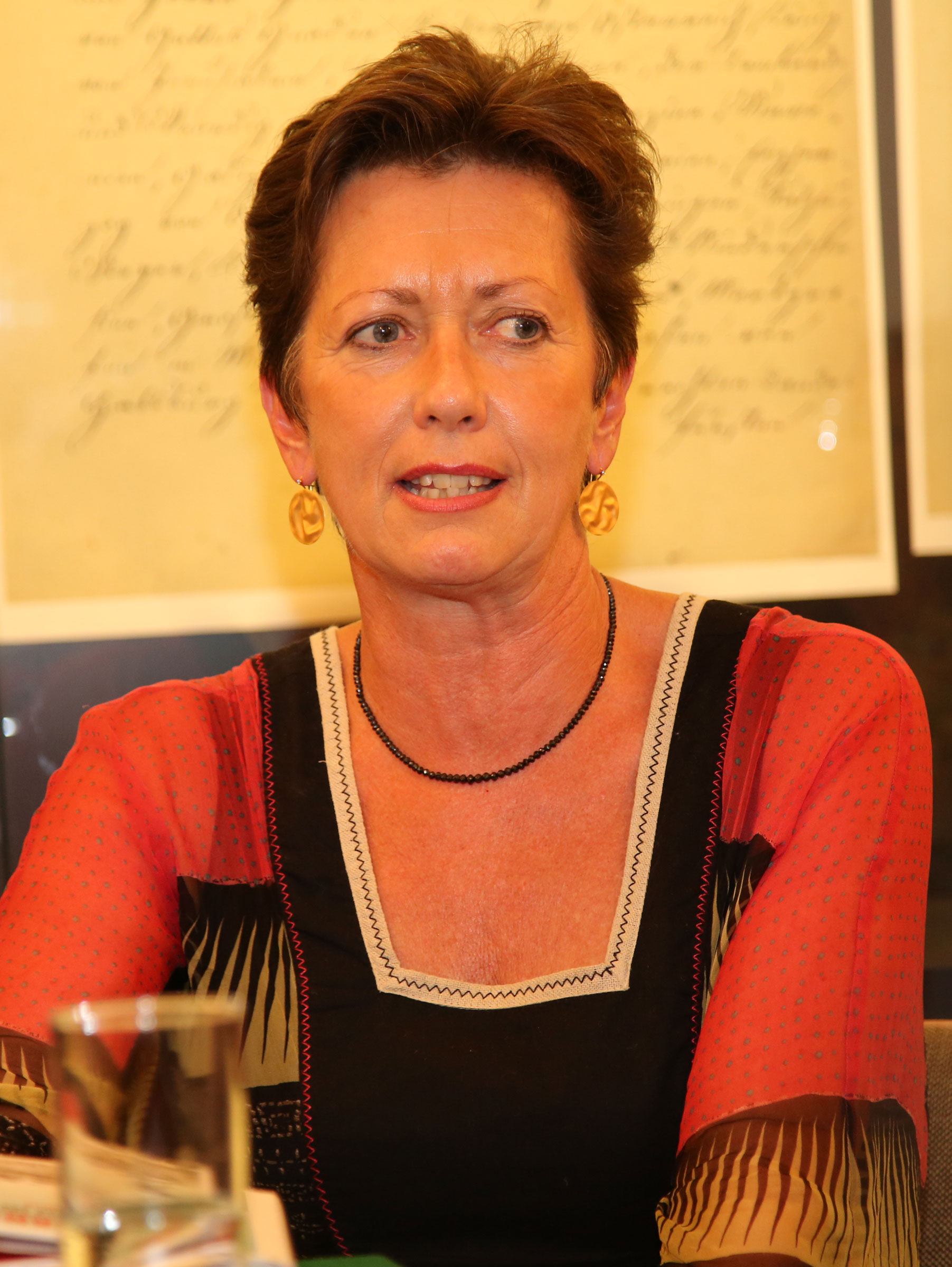 Kircher_Monika-7294